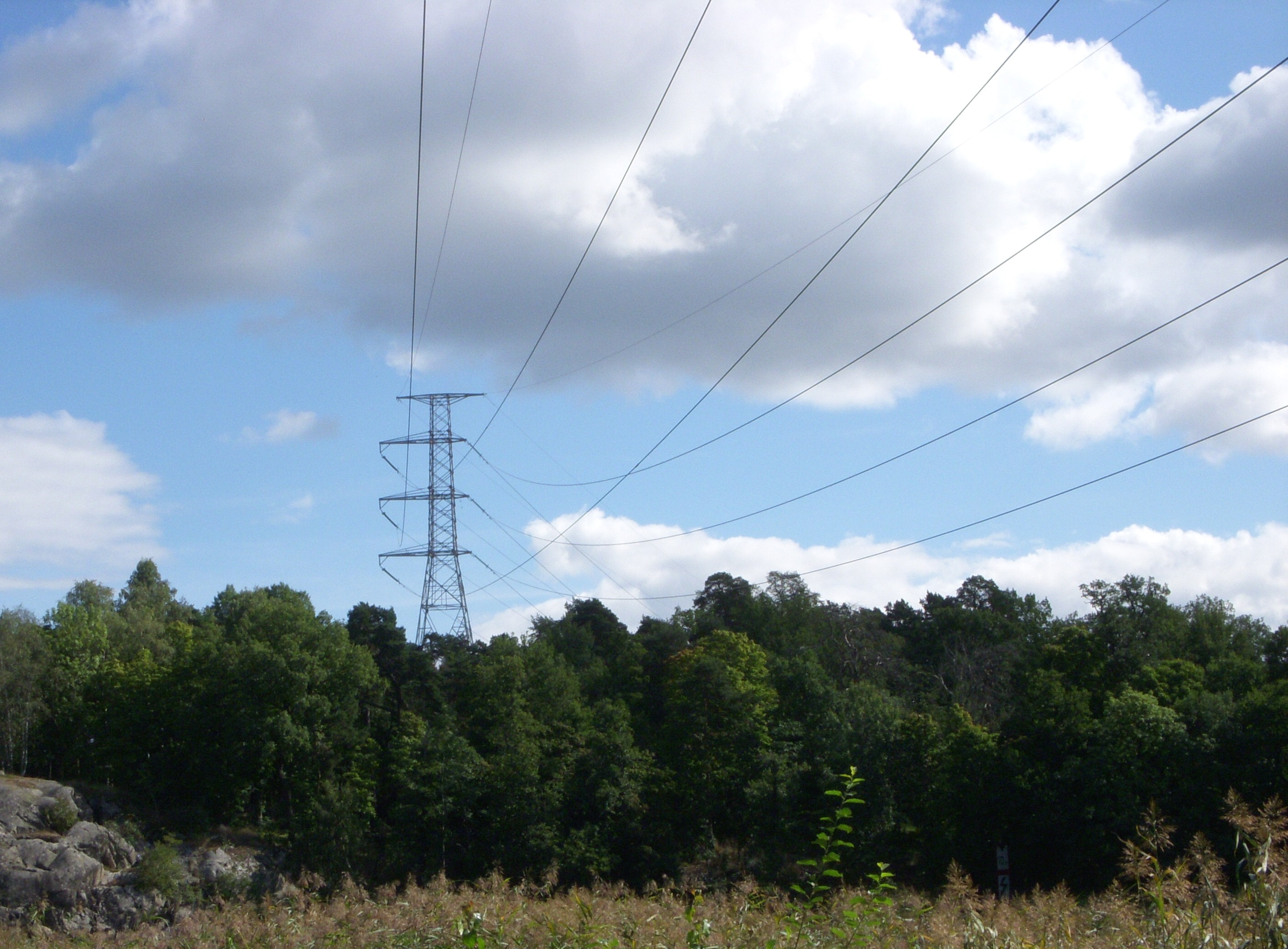 Kraftledning Untran-Värtan